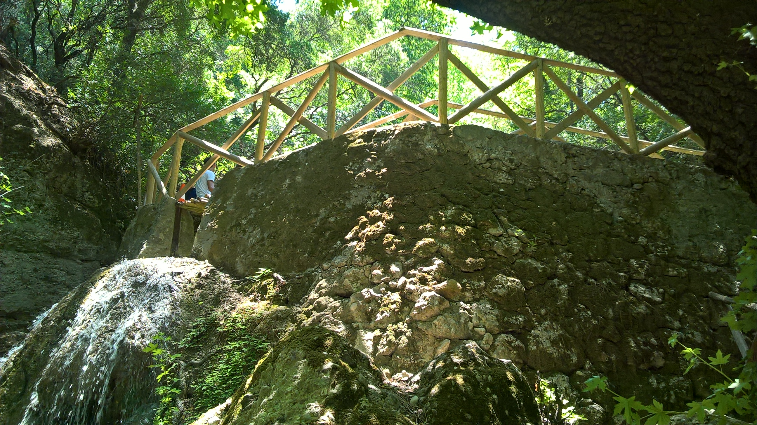 Γεφύρι στην κοιλάδα των πεταλούδων στη Ρόδο